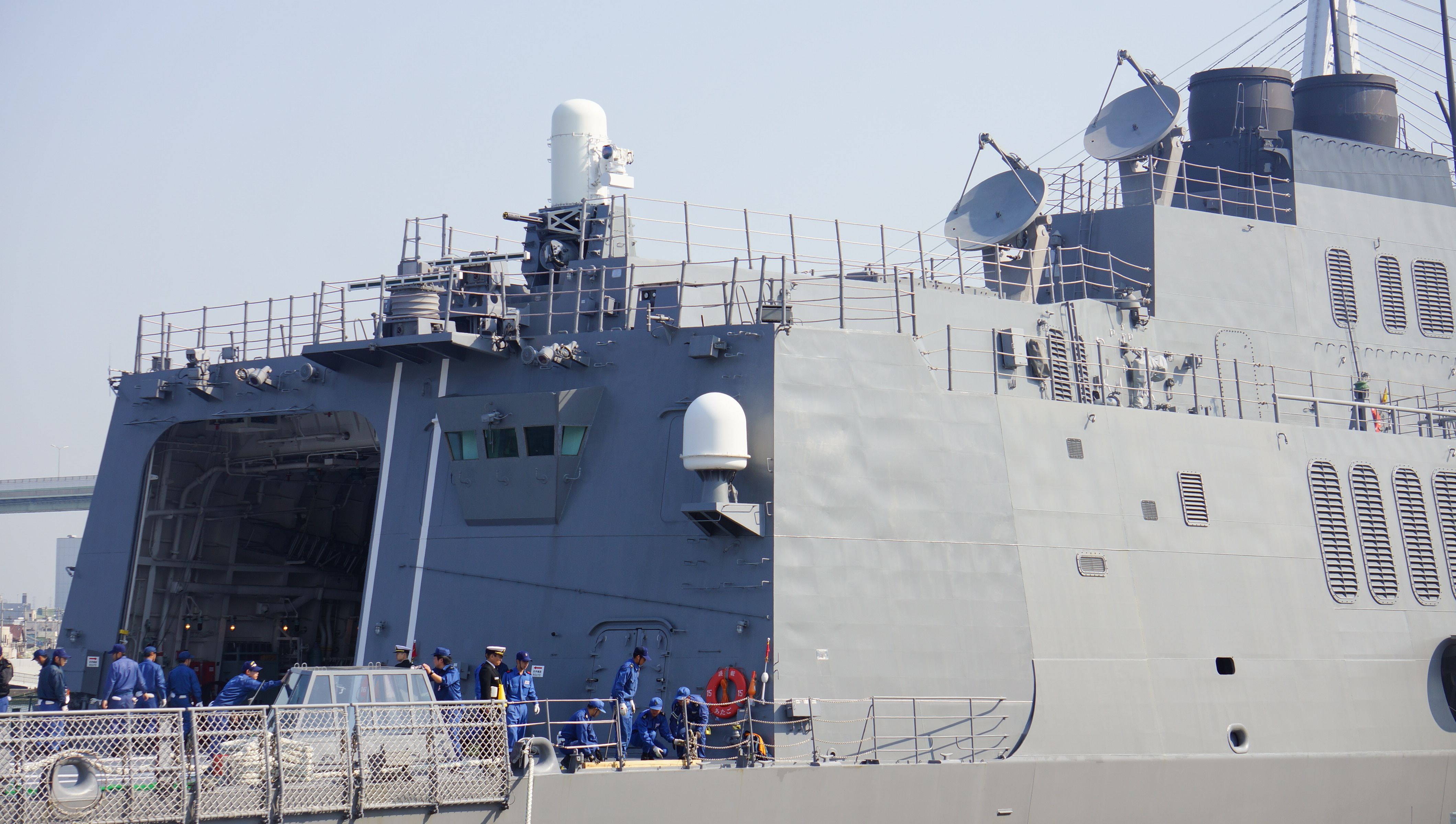 海上自衛隊 護衛艦あたご（DDG-177） ヘリコプター格納庫。 14年4月26日 天保山埠頭にて。